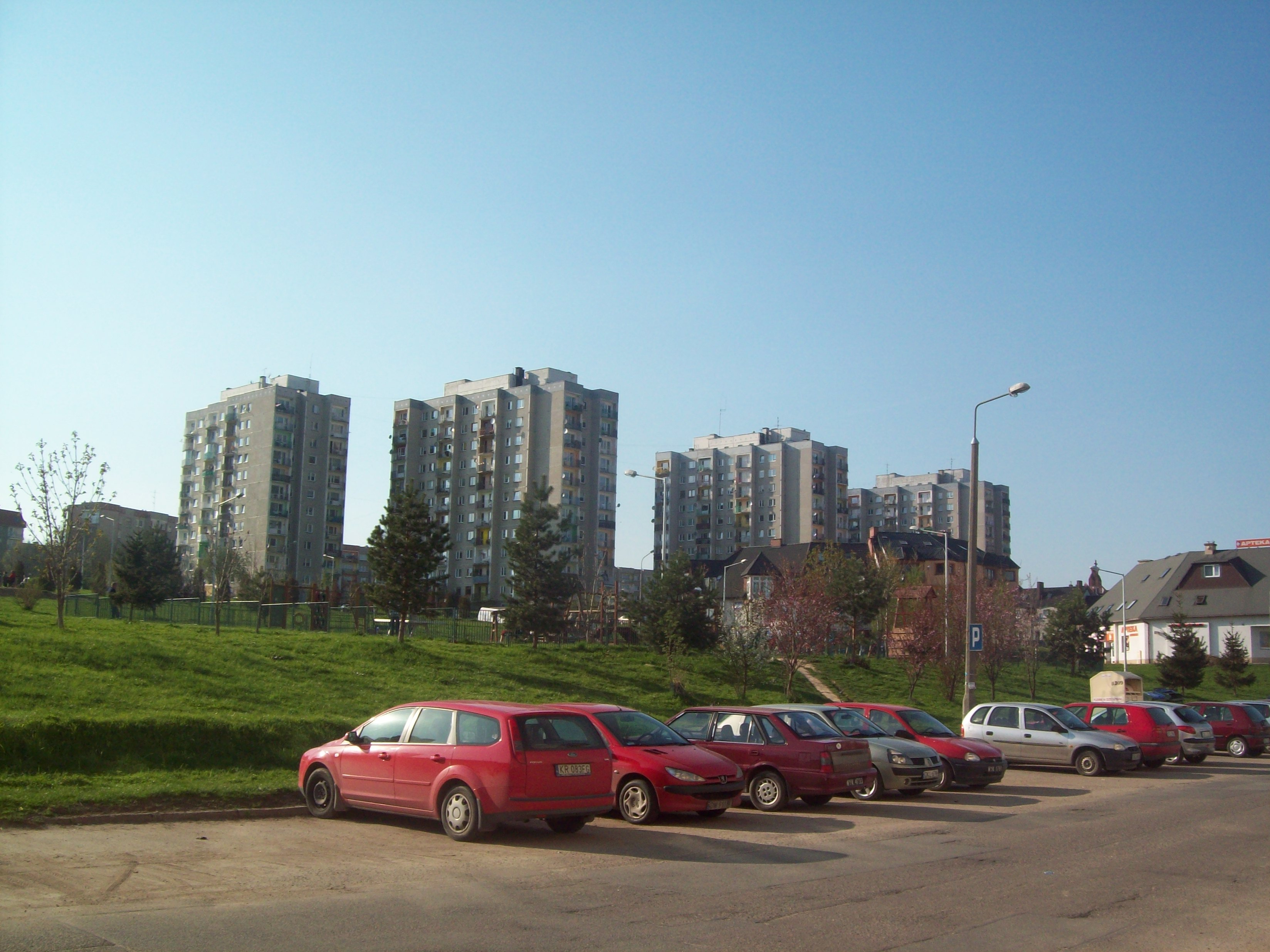 Punktowce na os. Kruczkowskiego w Kłodzku